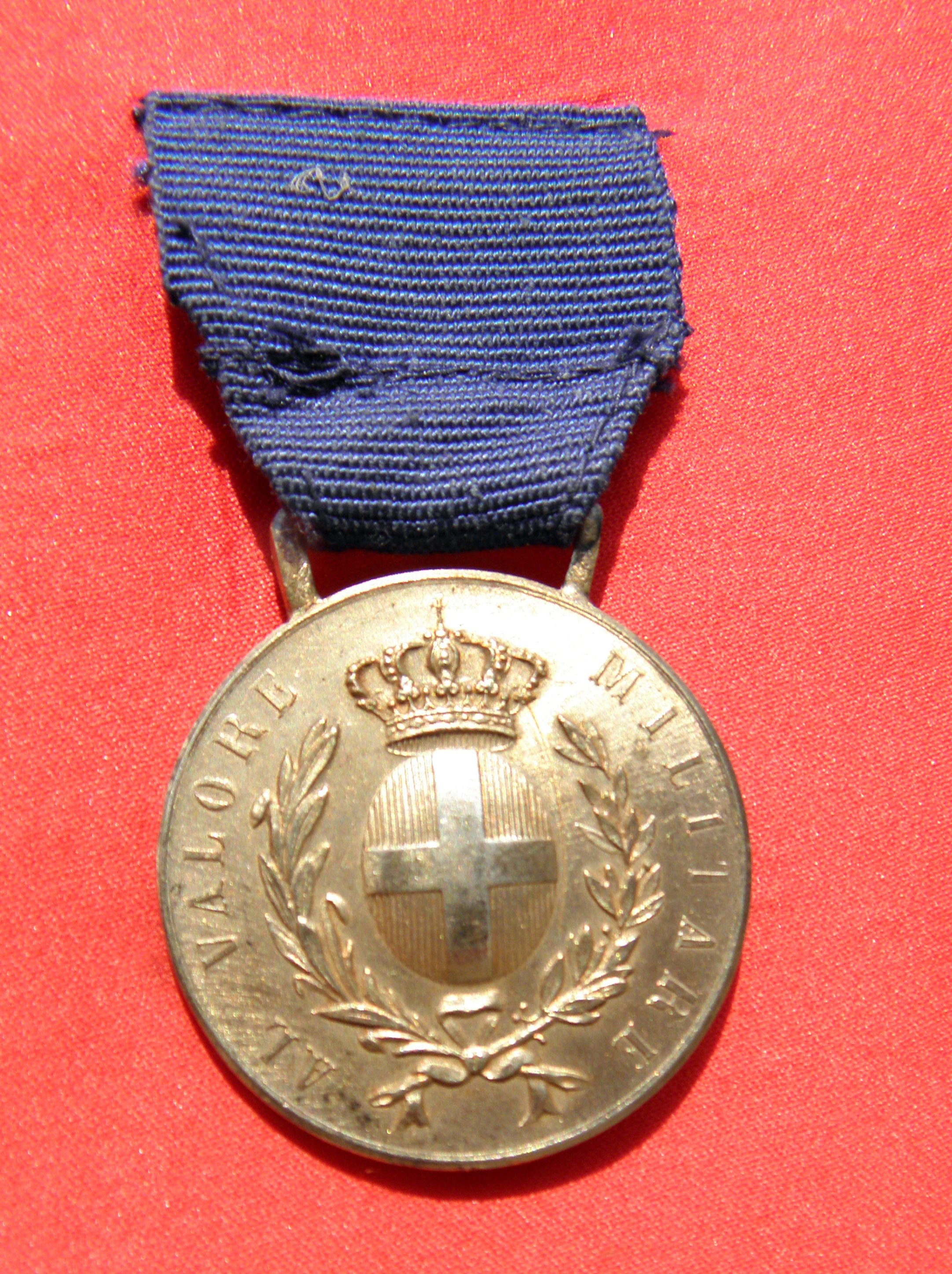 Medaglia d'oro al Valor Militare emessa durante il Regno d'Italia presente sullo stendardo dell'Associazione Nazionale del Fante, sezione provinciale città di Rovigo.